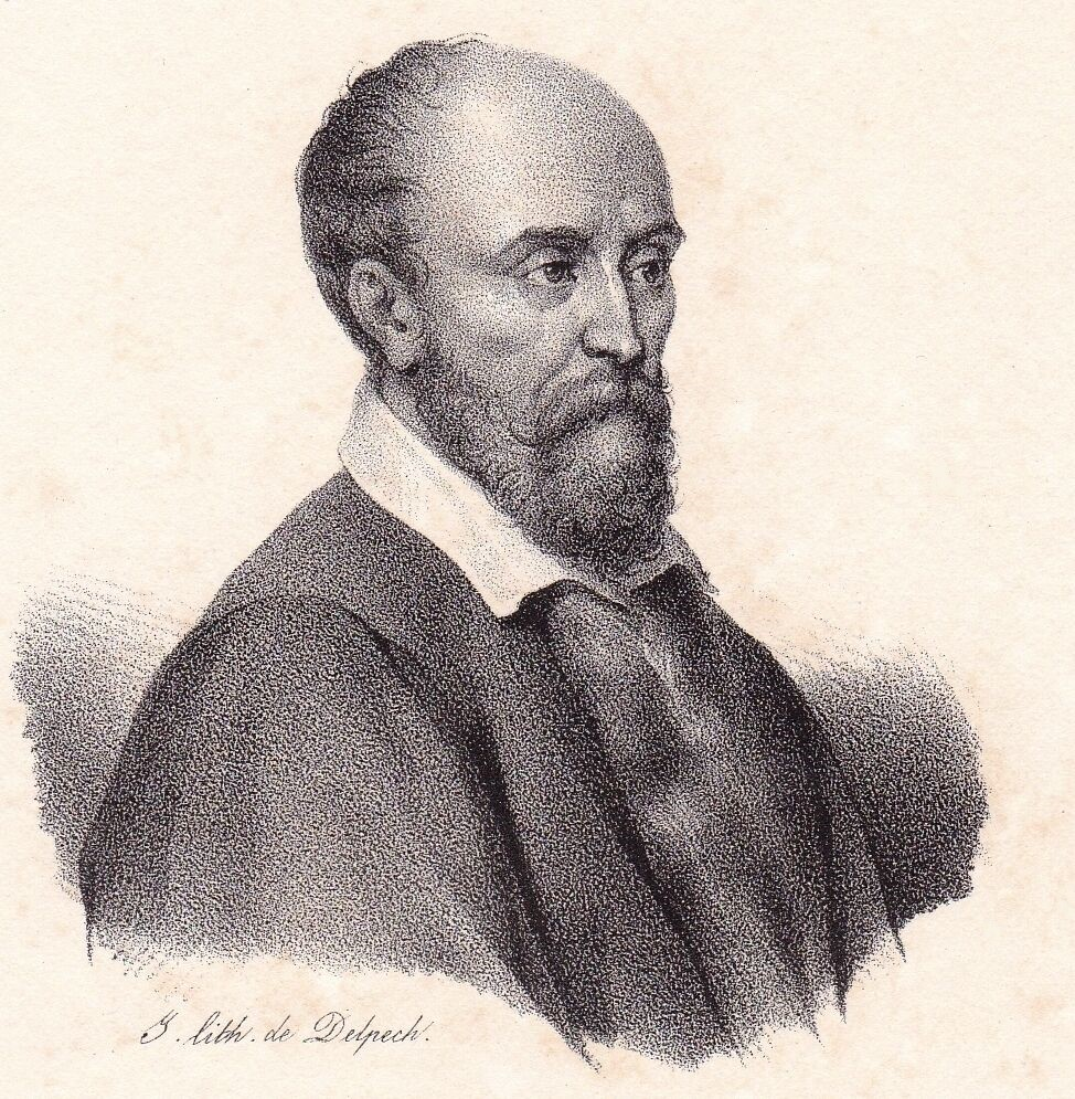 Portrait of Pierre de Ronsard